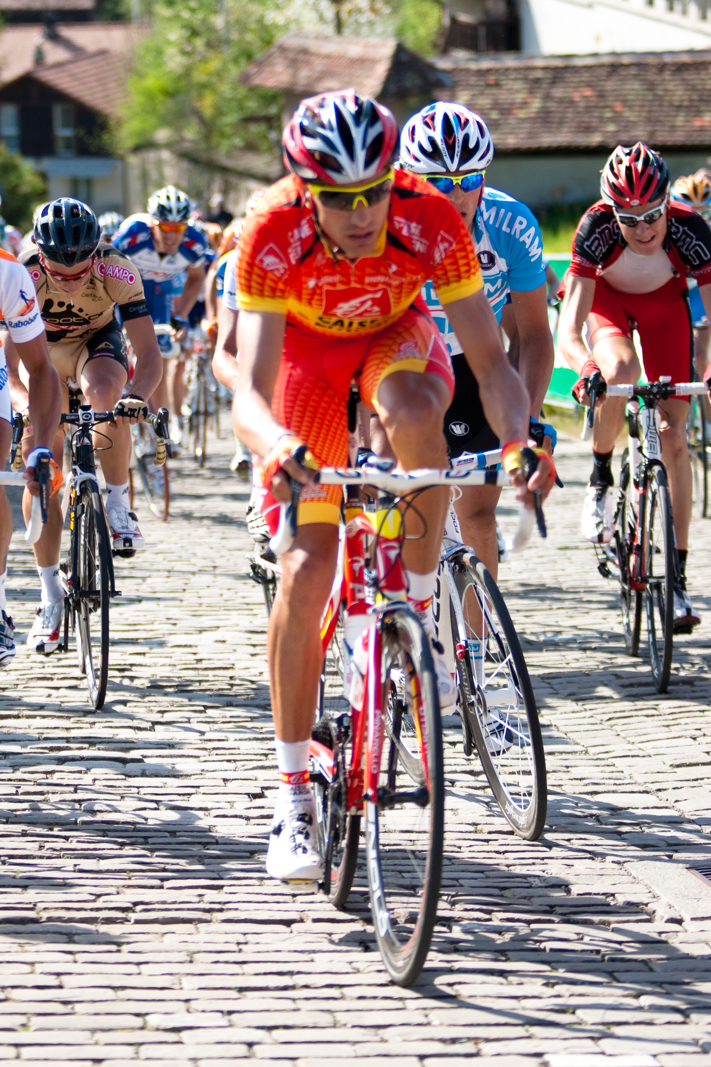 Rubén Plaza lors de la seconde étape du Tour de Romandie 2010.